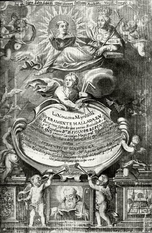 Portada de la primera edición de "La Novena Maravilla" compilación de 30 sermones de Juan de Espinoza Medrano "El Lunarejo", siglo XVII.